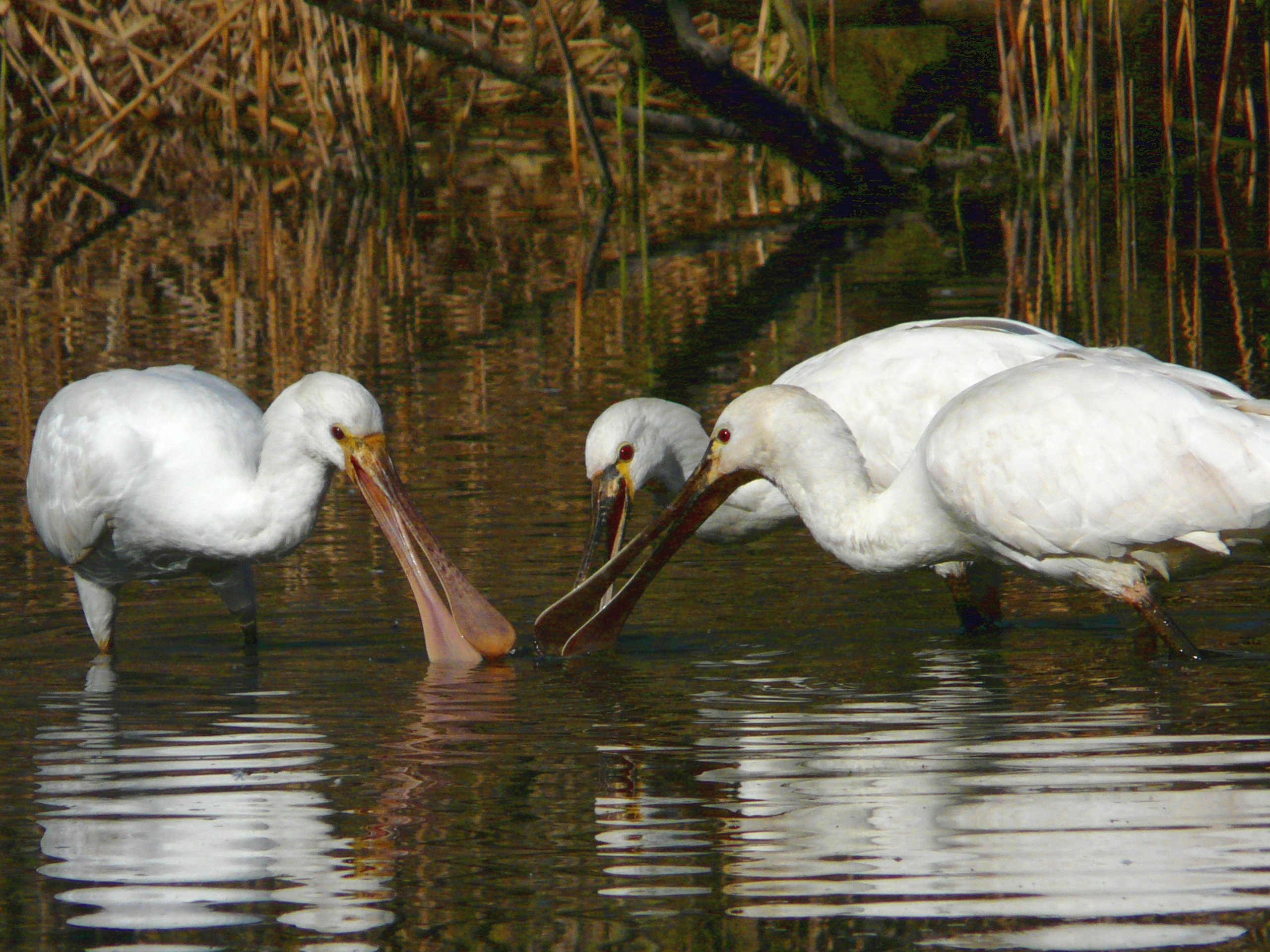 tre spatole bianche (Platalea leucorodia) cacciano in uno stagno. Oasi s.Alessio zoo, Pavia, Italia